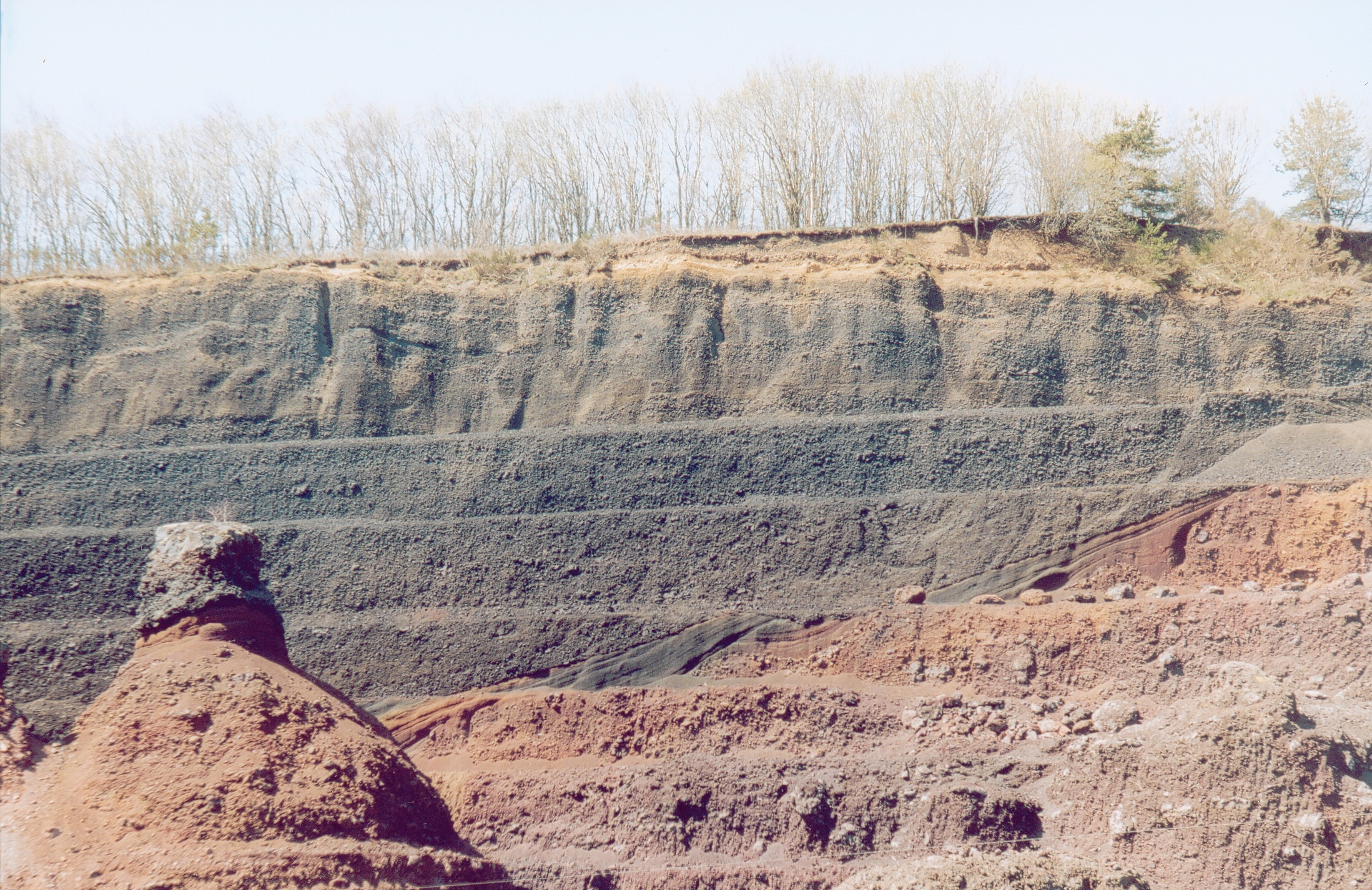 Le puy de Lemptégy Puy-de-Dôme France Photographie prise par Patrick GIRAUD